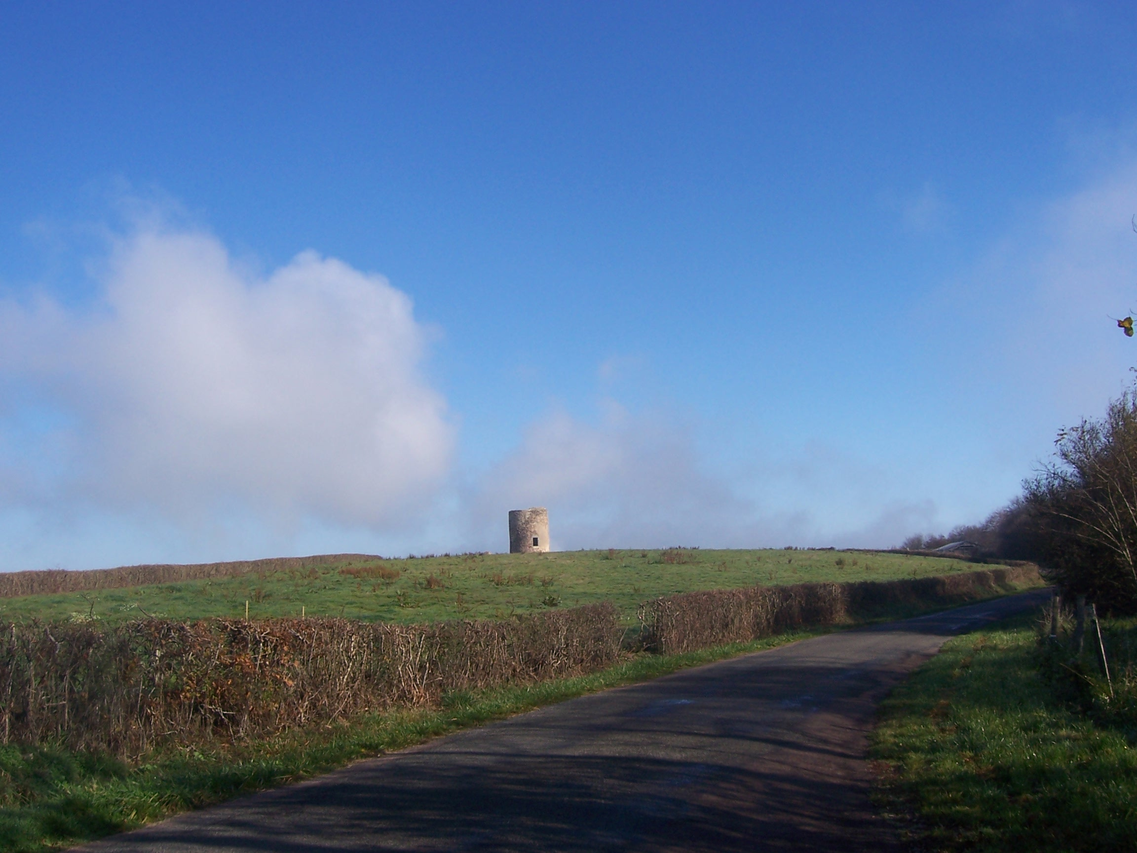 Tour de Saint-Martin-d'Auxy